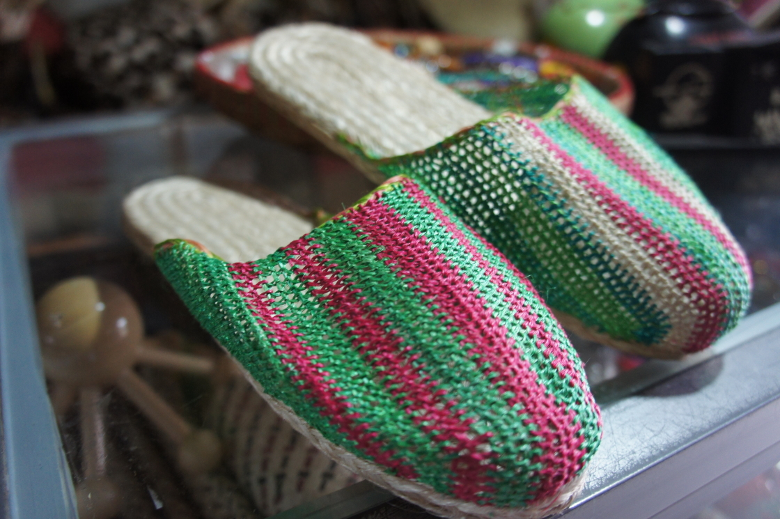 Abaca slippers